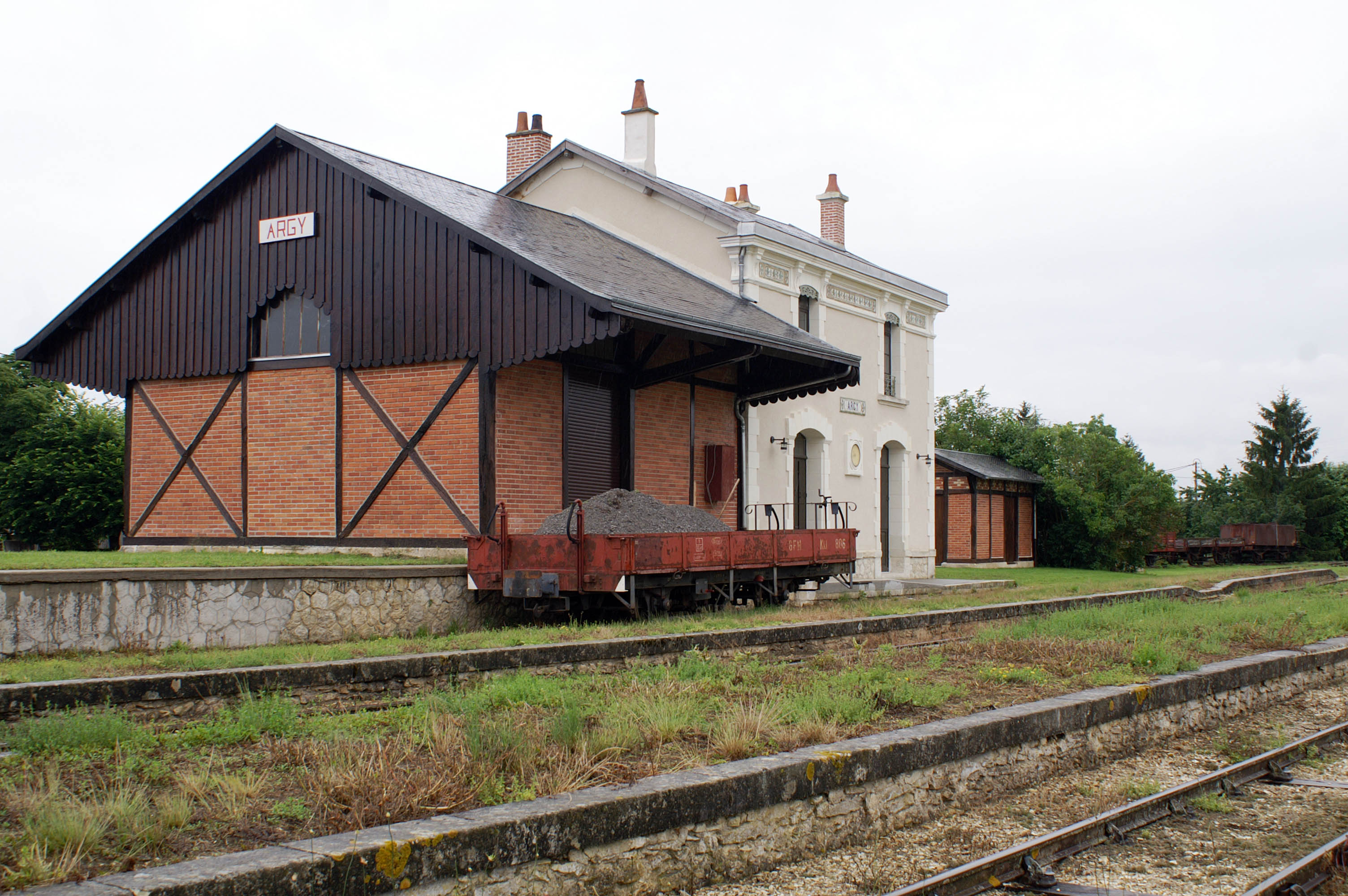 Ancienne gare du chemin de fer du Blanc Argent. Fermée, puis restaurée pour une utilisation par le Train du Bas-Berry qui exploite un chemin de fer touristique et historique sur la section de la ligne du BA, de Luçay-le-Mâle à Argy.